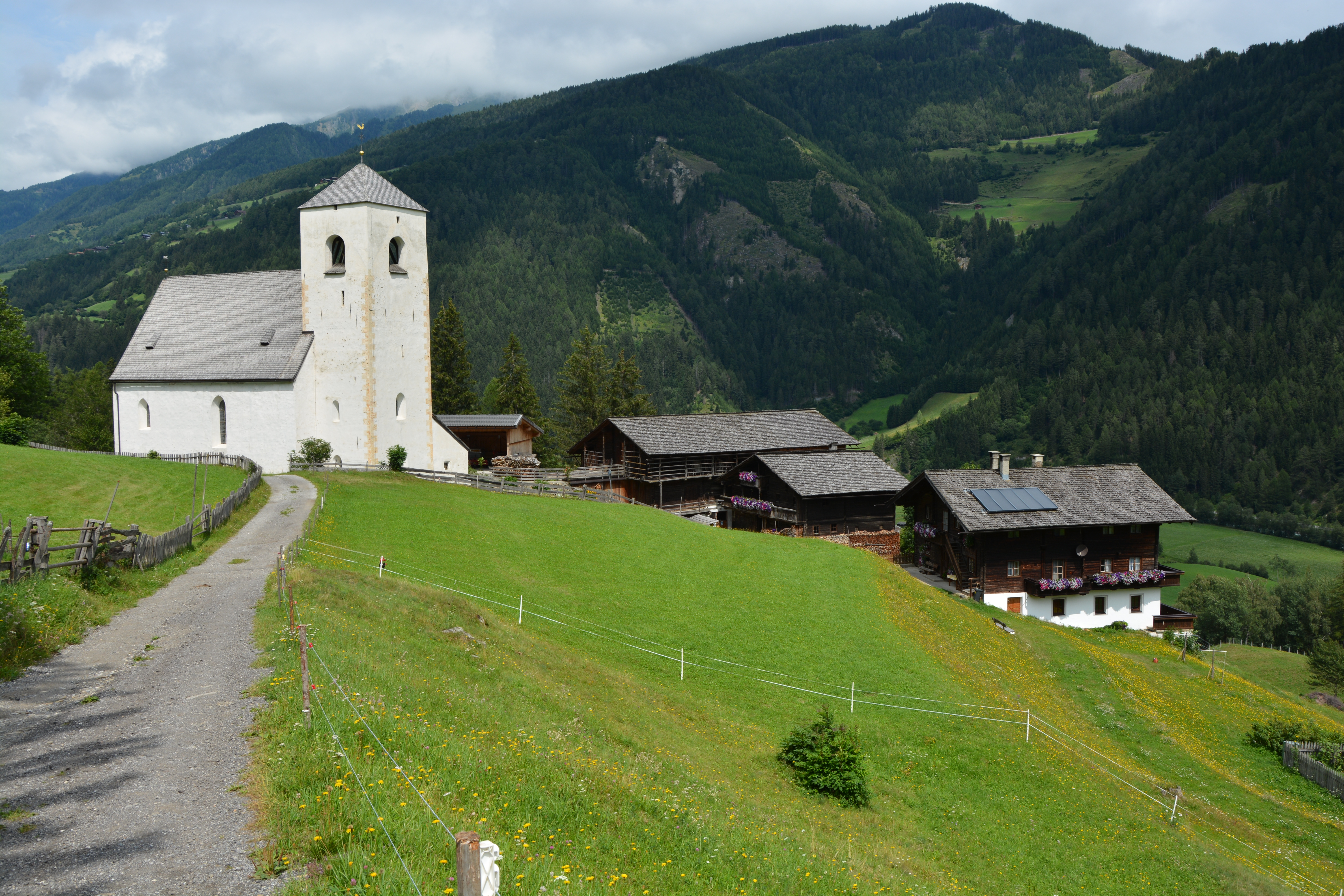 Die St. Nikolauskirche in Matrei in Osttirol mit den Bauernhöfen Klabiner und Messner.